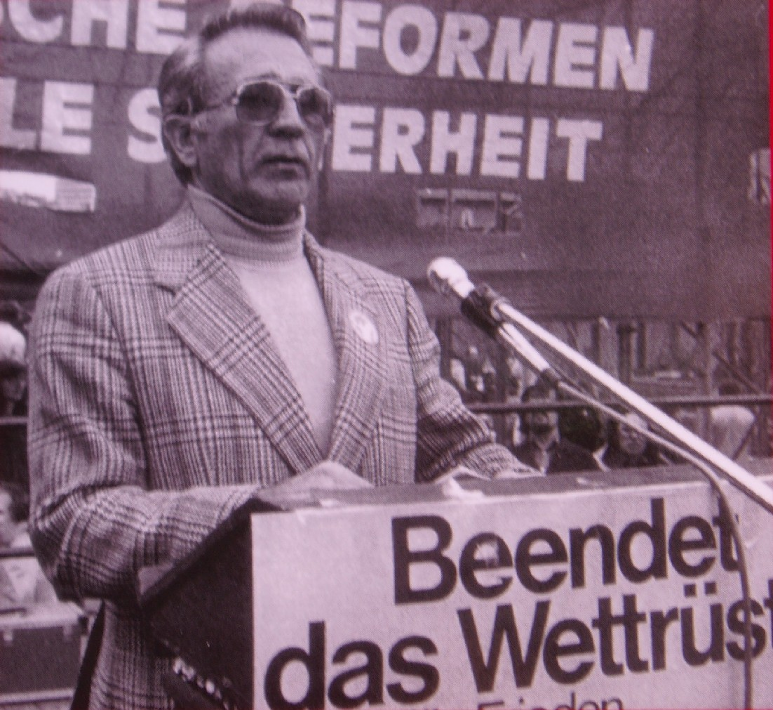 Lorenz Knorr bei einer DFU-Wahlkampfveranstaltung